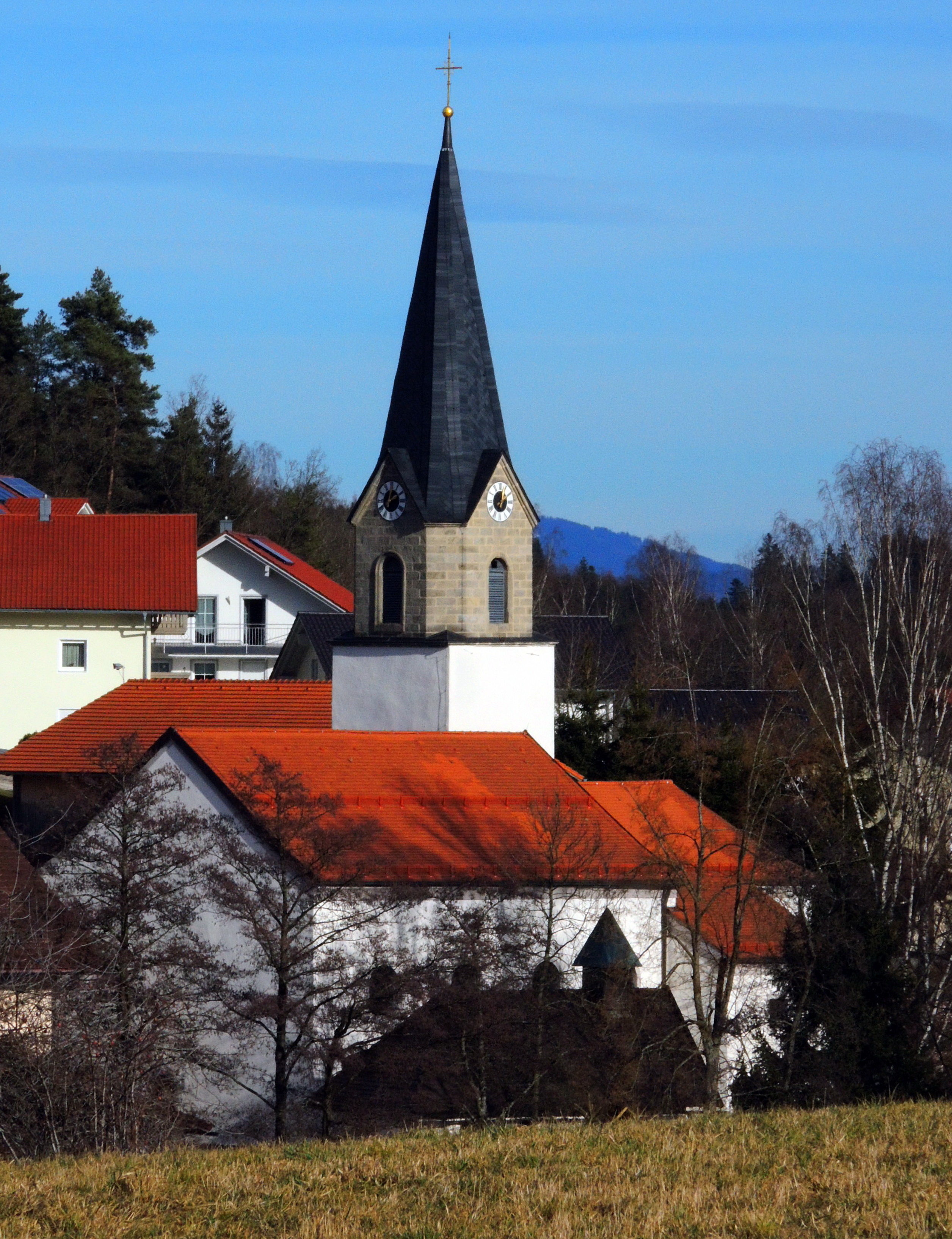 Katholische Pfarrkirche St. Jakobus in Achslach - Aussenansicht aus südwestlicher Richtung